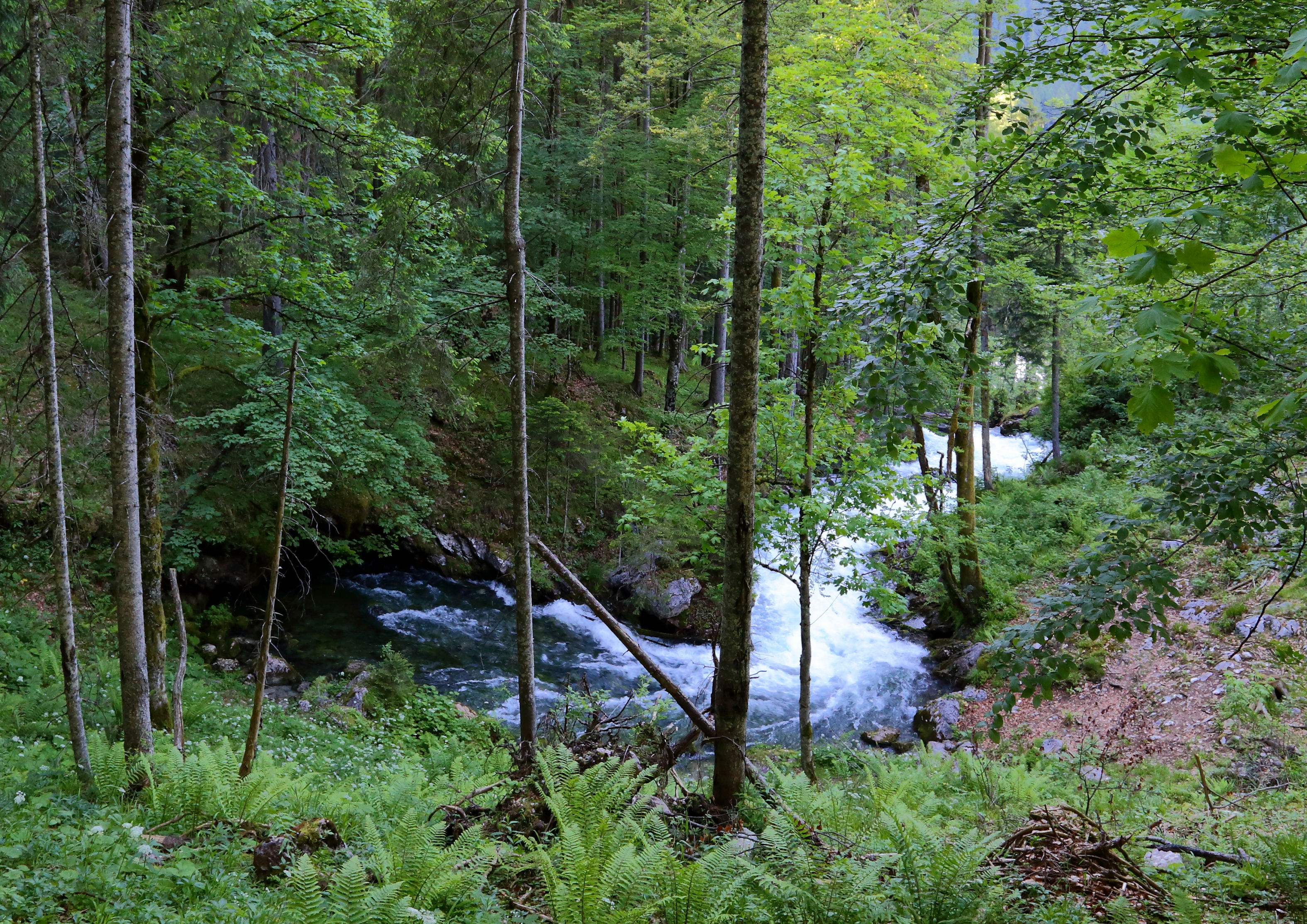 Die Ursprungsquelle des Waldbaches im Echerntal der oberösterreichischen Marktgemeinde Hallstatt.